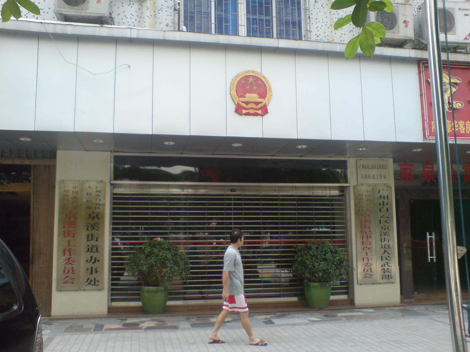 中文（中国大陆）: 广州白云区京溪街道办事处